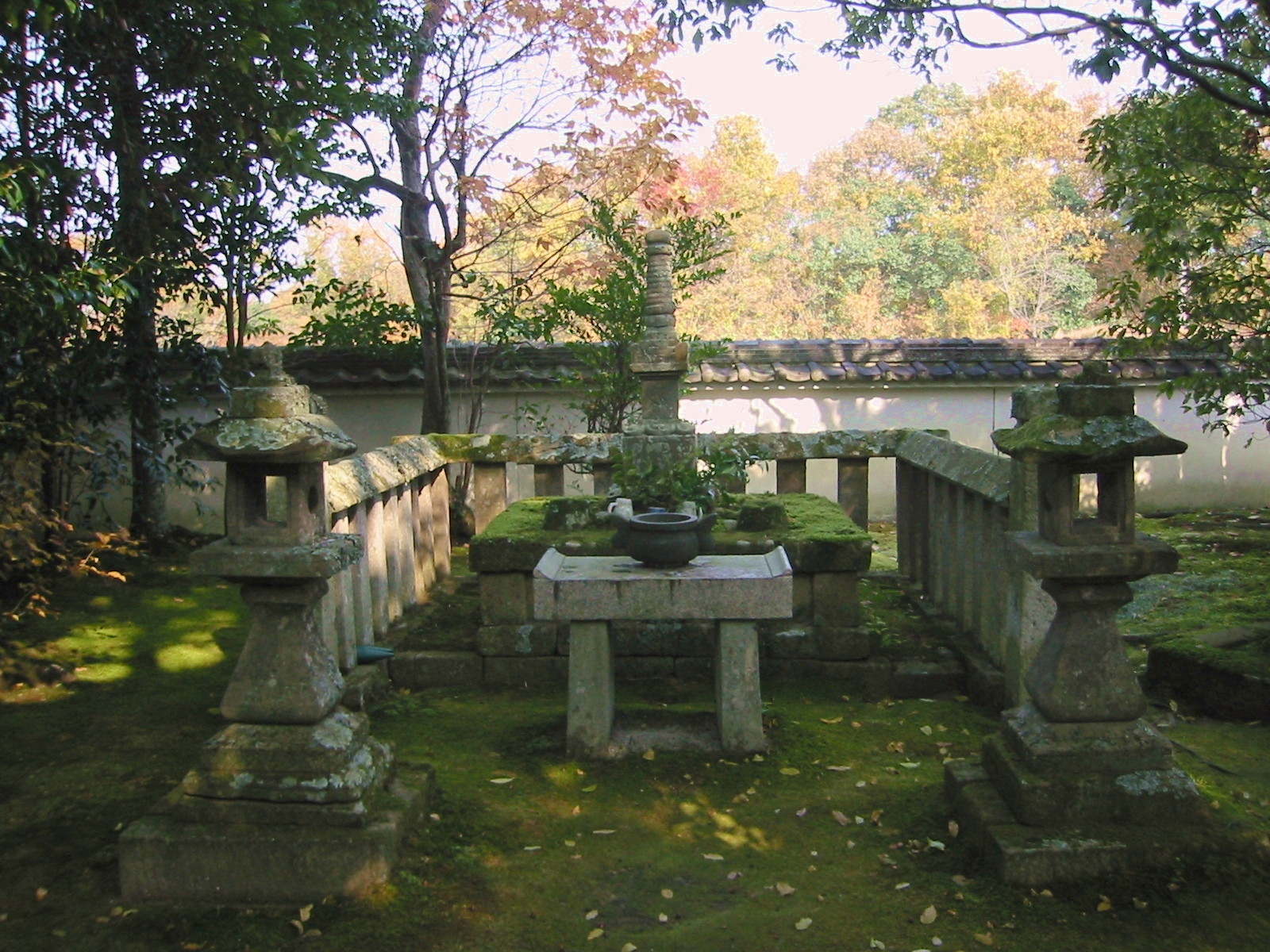 播磨 東条町 安国寺 嘉吉史蹟 足利義教公首塚 宝篋印塔 173Cm Ashikaga Yoshinori tomb